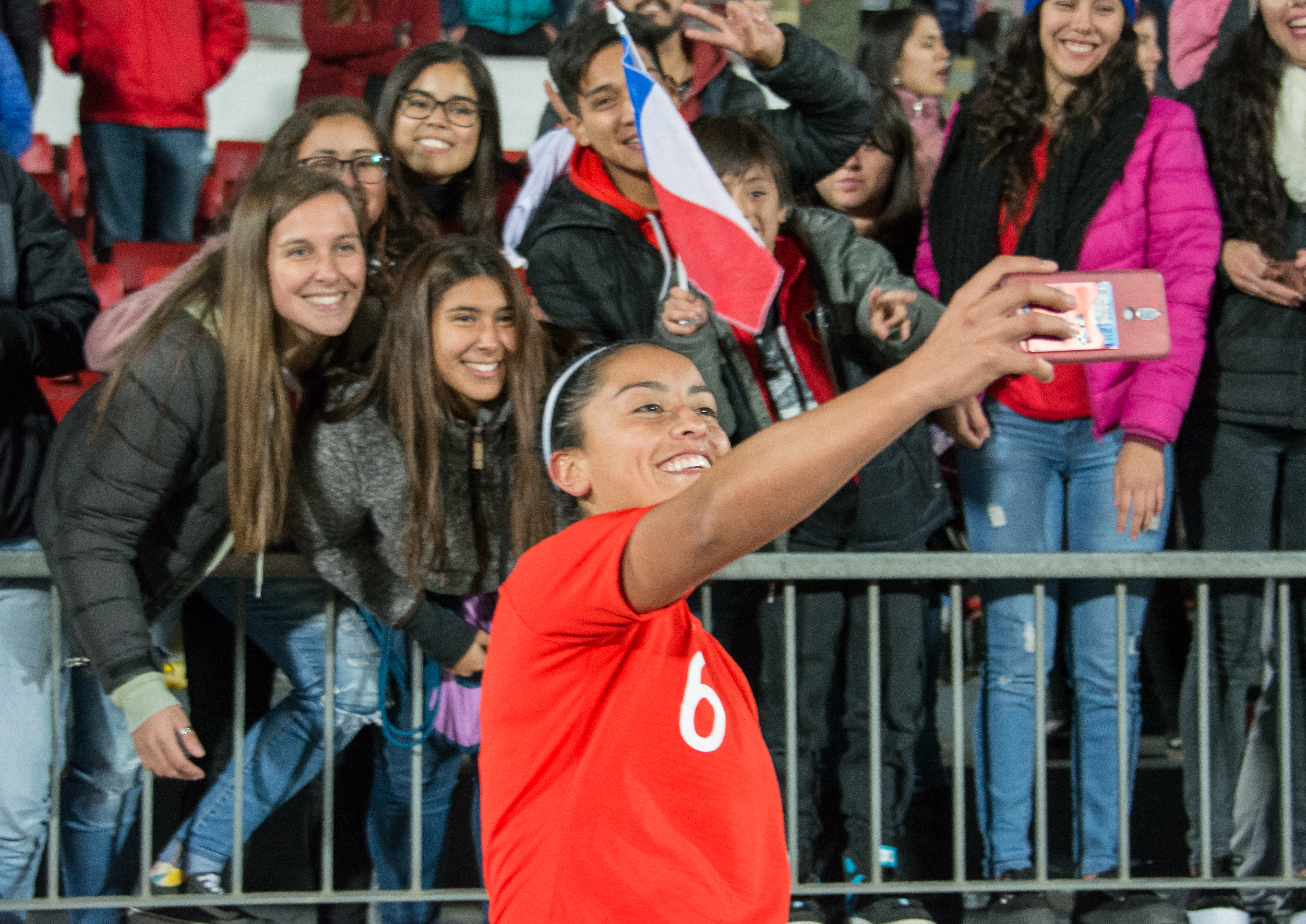 Claudia Soto, Chile v Colombia, Estadio Nacional, Ñuñoa, Santiago, Chile.